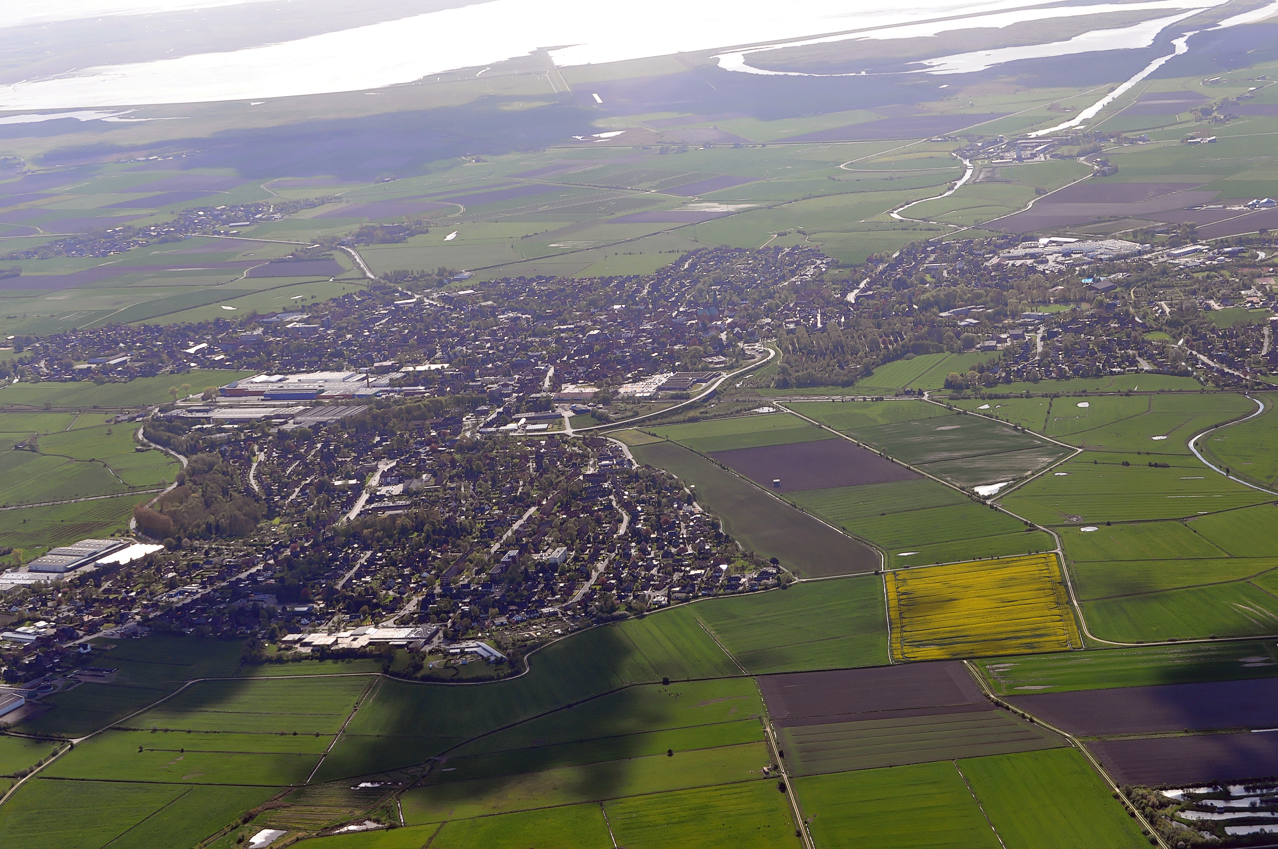 Luftbilder von der Nordseeküste 2012-05